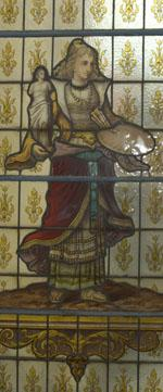 glas-in-loodraam